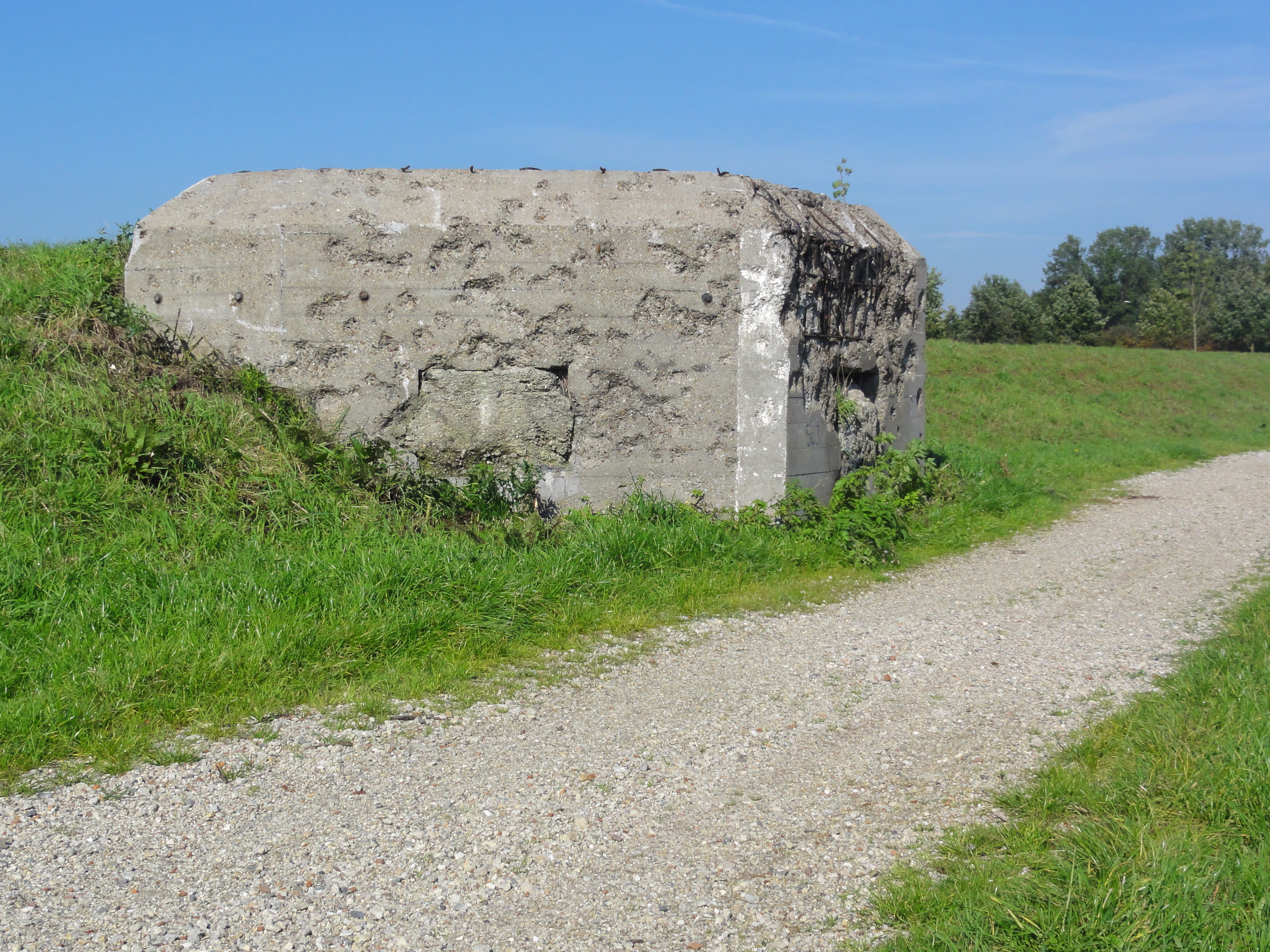 Mill Rijksmonument 525576 S-kazemat 543 langs Defensiekanaal tegen aarden wal 8″ N, 5° 46′ 41.61″ E